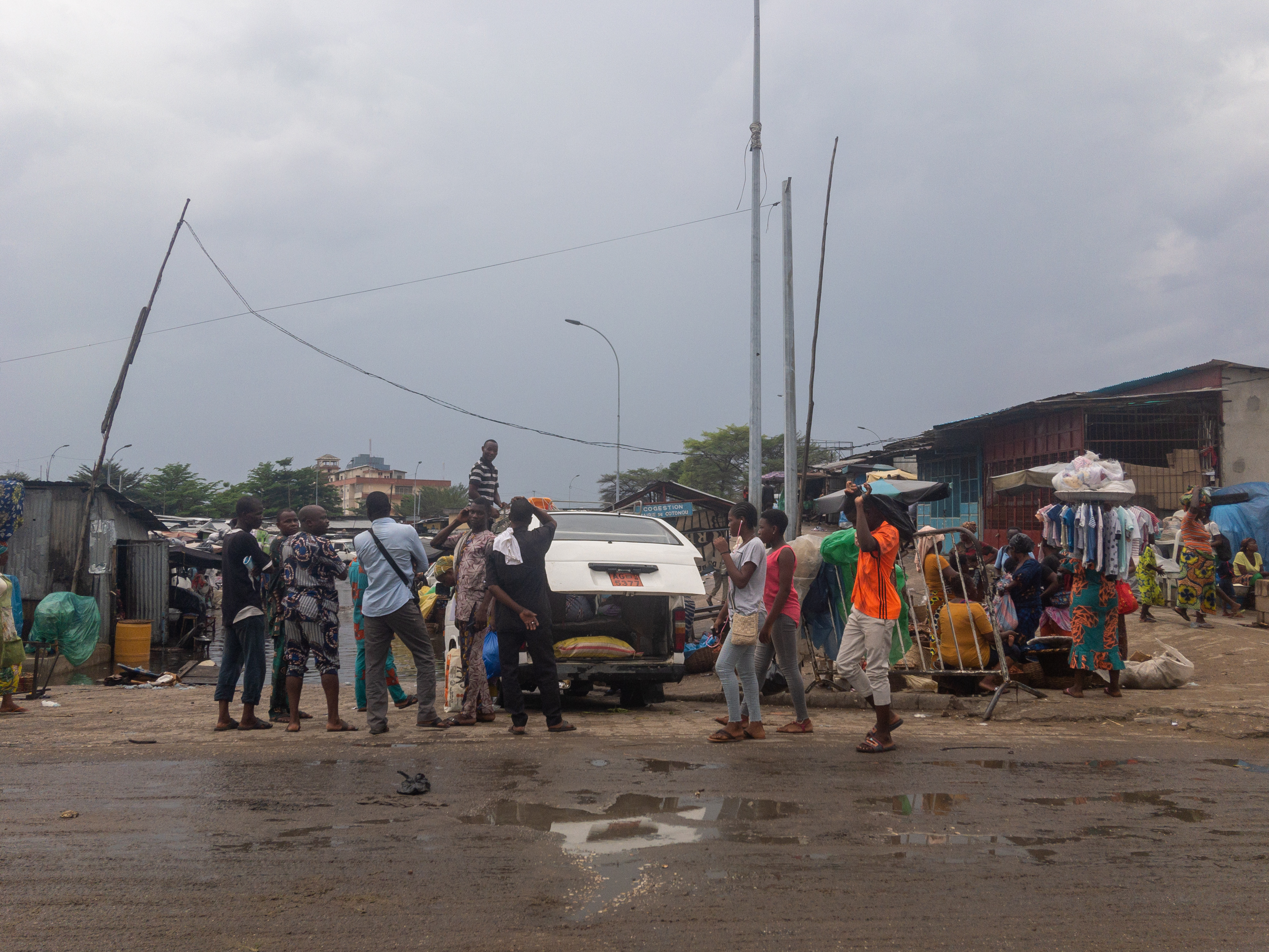 Chargement d'un tokpa-tokpa à Dantokpo This is an image with the theme "Africa on the Move or Transport" from: Benin